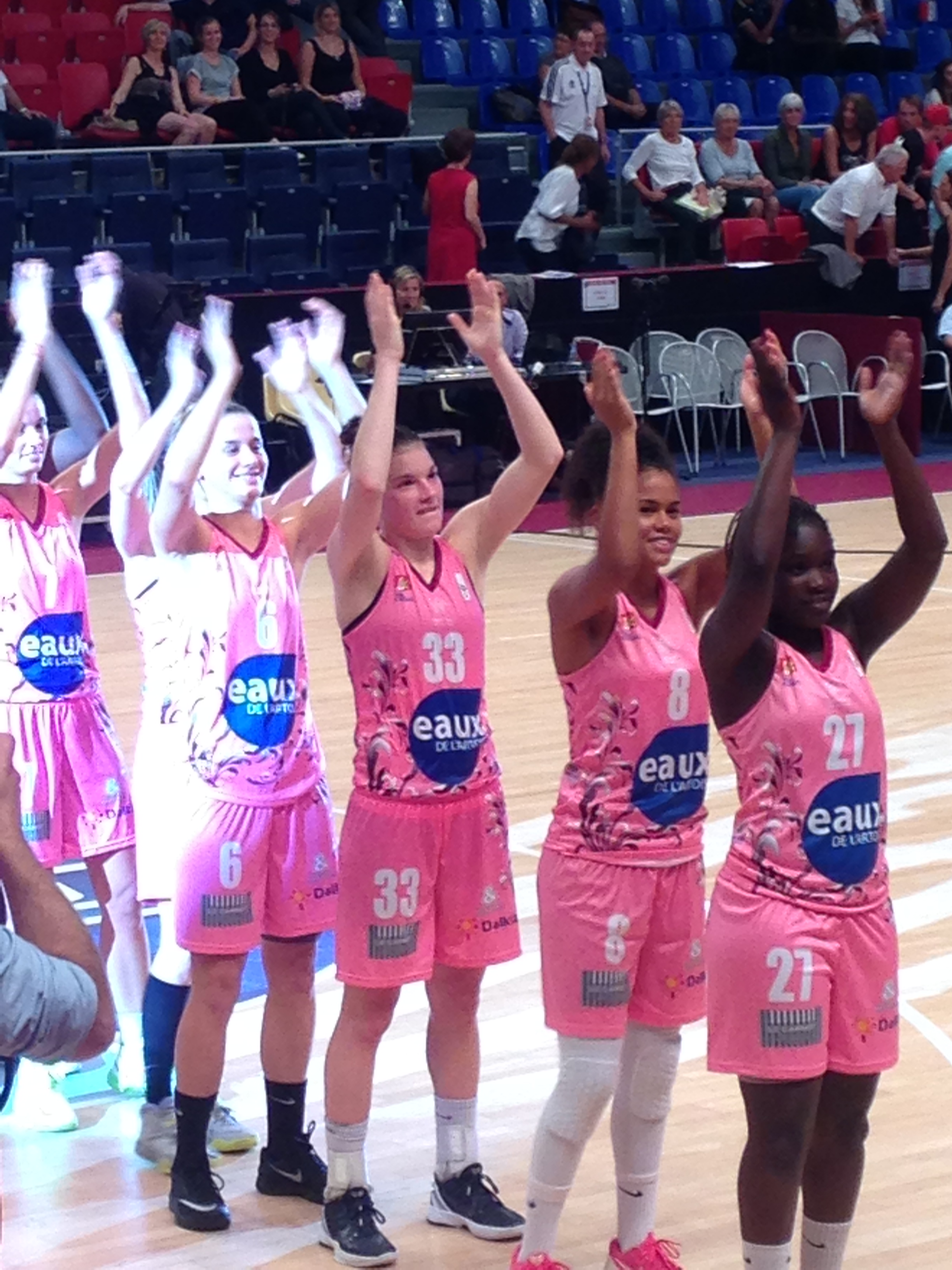 Maggie Lucas (33) et l'équipe d'Arras après sa victoire lors de l'Open LFB 2014